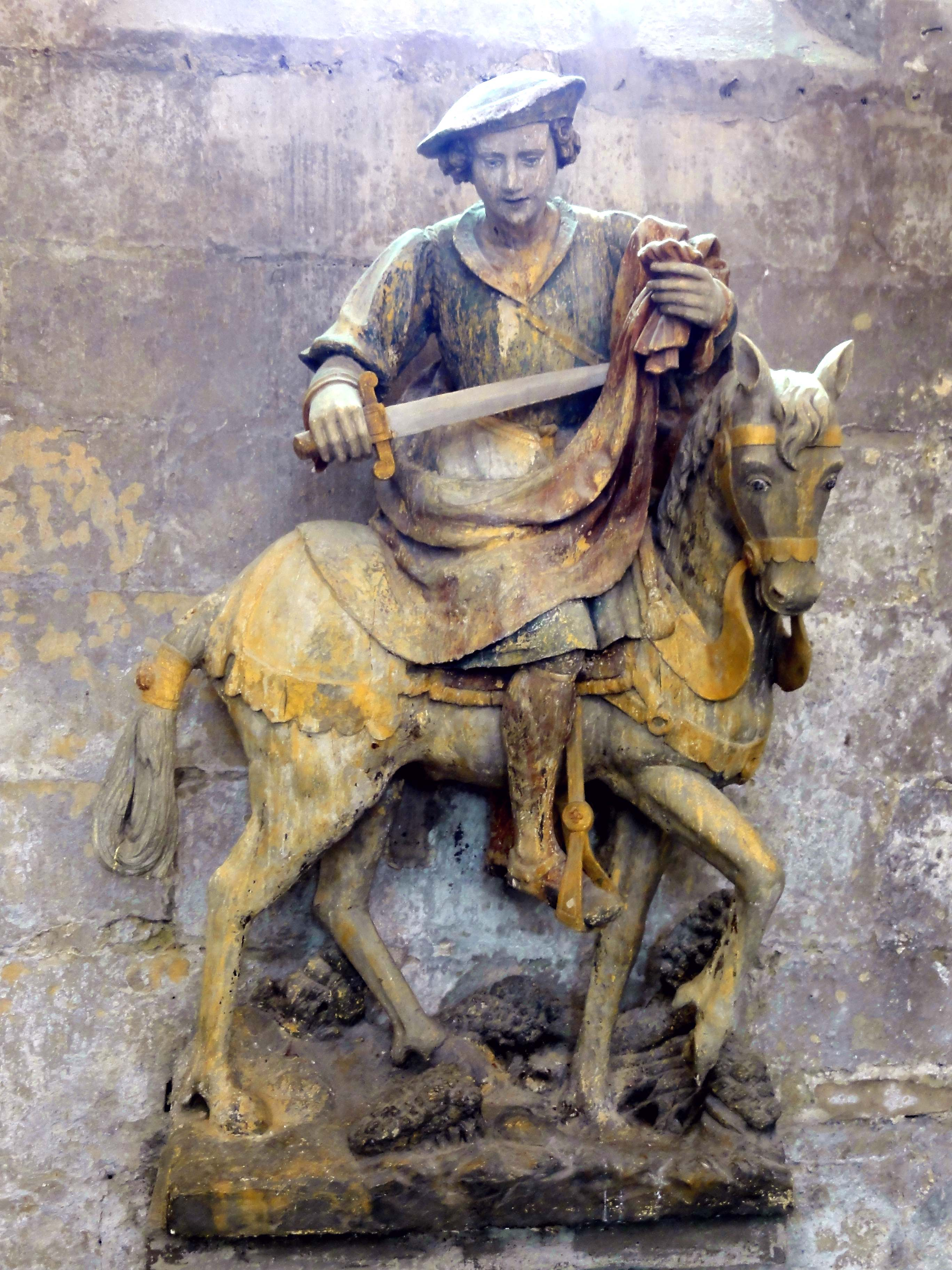 Mobilier de l'église Saint-Martin de Cires-lès-Mello (voir titre).